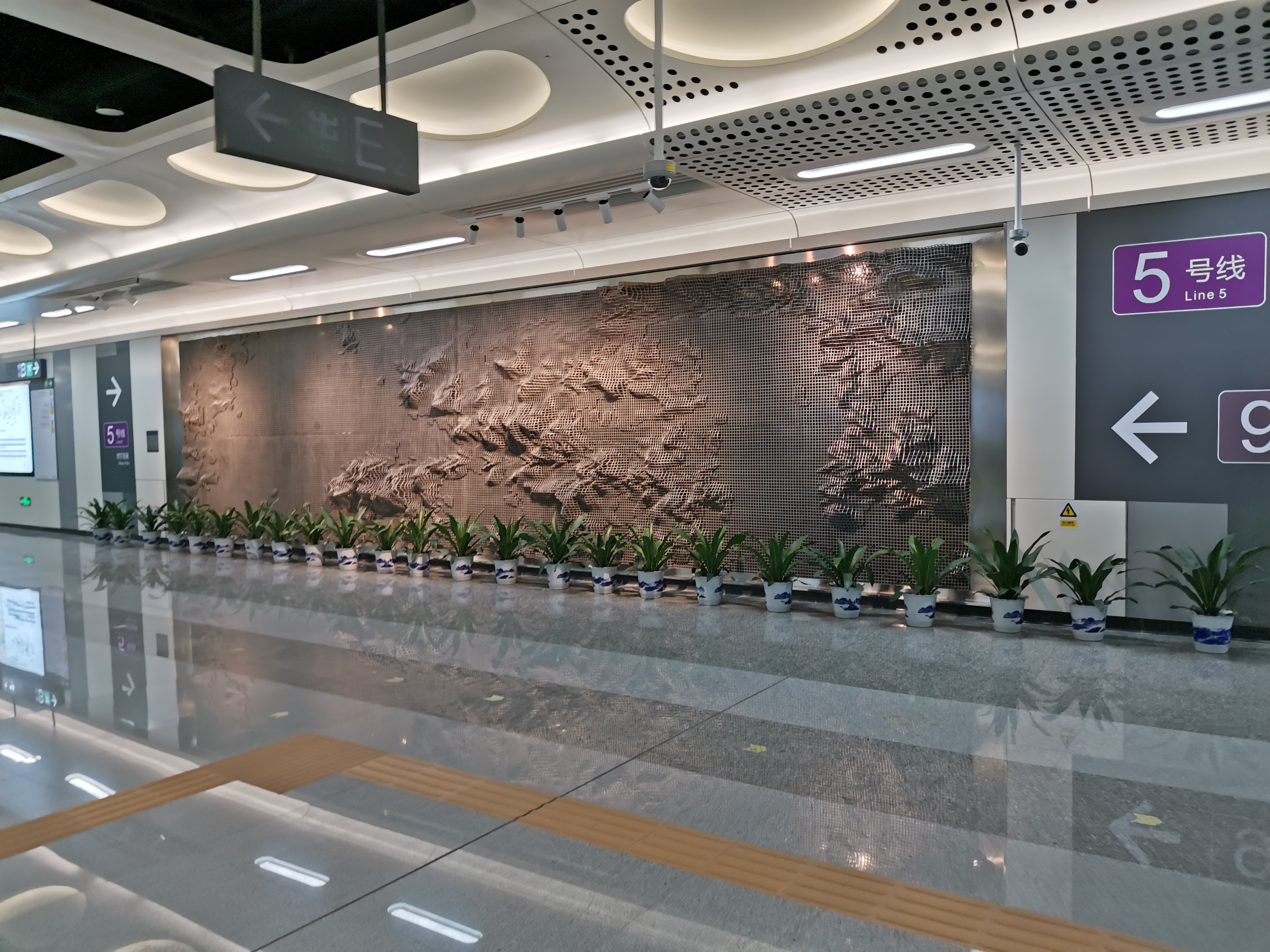 前湾站艺术墙之一，位于9号线站厅区，以铁网和水泥为主要材料